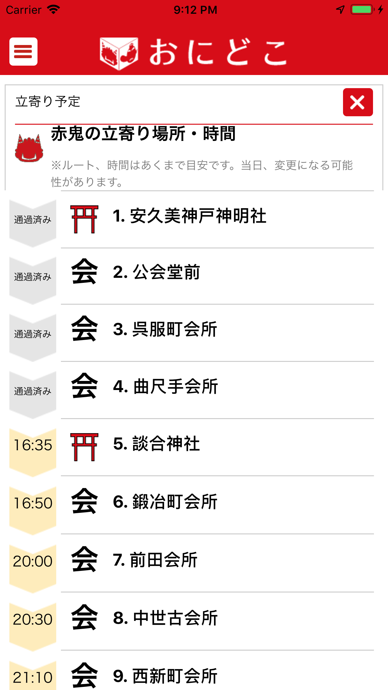 おにどこの画面 鬼などの立ち寄り時間と場所が分かる